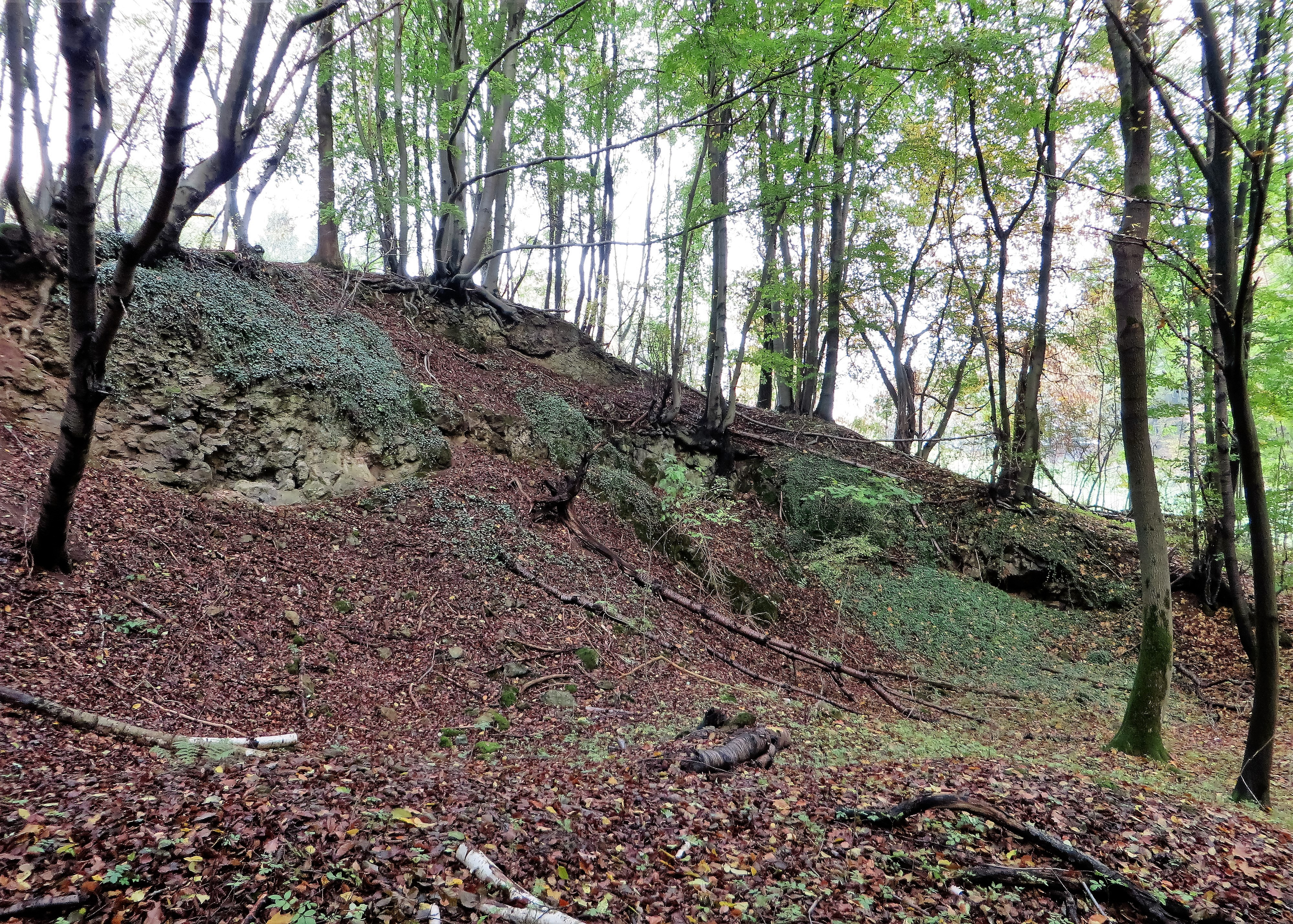 Geschützter Landschaftsbestandteil „Volmeabstieg“ in Hagen, zwischen dem Volmeabstieg und der Staplackstraße. Es handelt sich um einen größtenteils gehölzfreien Kalksteinbruch im Massenkalk des Oberen Mitteldevons, der z.Zt. verfüllt wird, sowie um einen angrenzenden Buchenwald mit hohem Unterholzanteil und um eine gehölzfreie Brachfläche. In der Steinbruchwand befinden sich zwei Eingänge und im nördlichen anschließenden Wald (Foto) ein weiterer Eingang zu teilweise ausgedehnten Karsthöhlen (Staplackhöhle, Hahnerthöhle, Weingartenhöhle). Im Landschaftsschutzgebiet „Asmecker Bachtal“ gelegen.